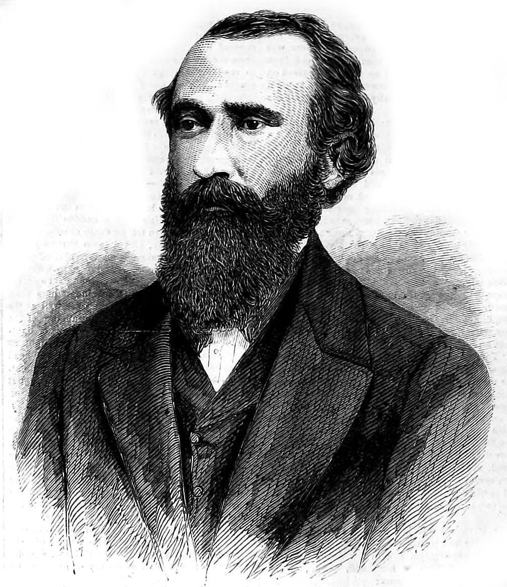 Edward W. Gantt